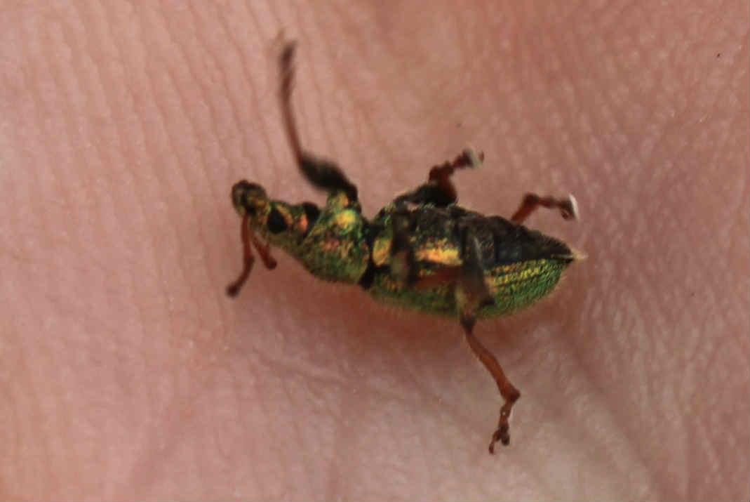 Phyllobius betulinus am 3.5.2017 in Walldorf/Baden